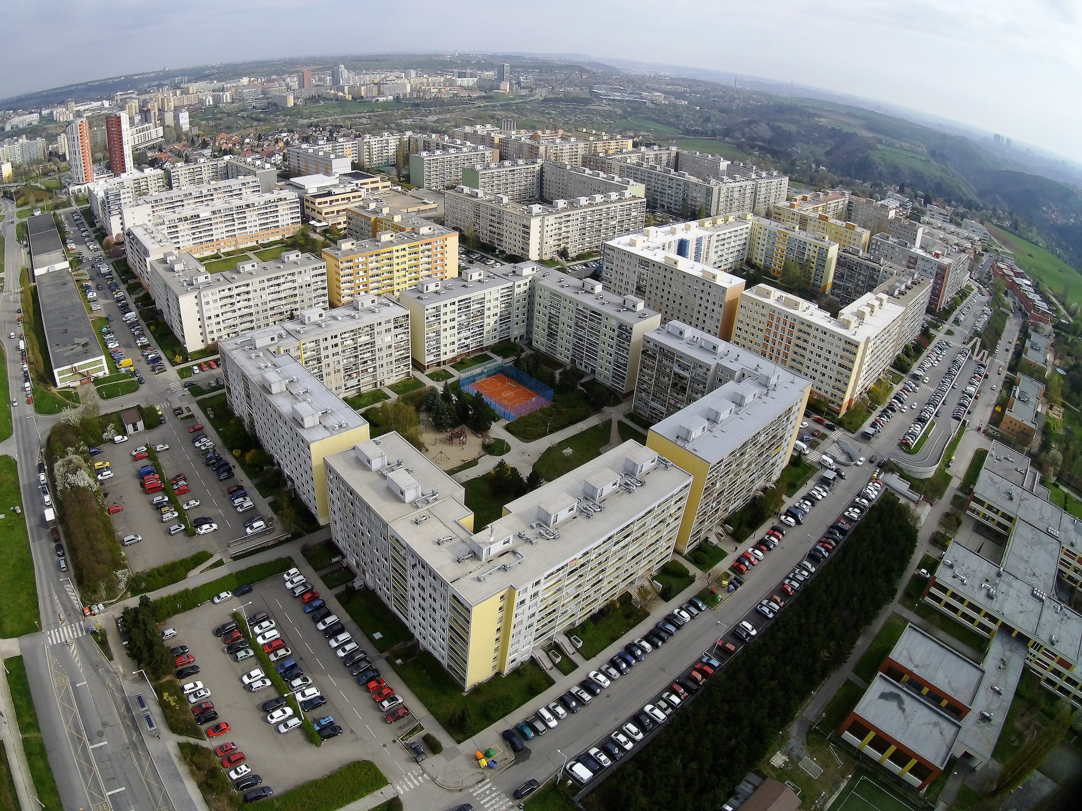 Pohled z jihozápadu